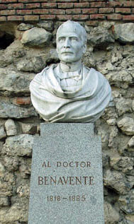 Es obra del escultor Ramón Subirach y Codorniú (1886). Homenaje de compañeros, discípulos y padres agradecidos al Dr. Benavente.